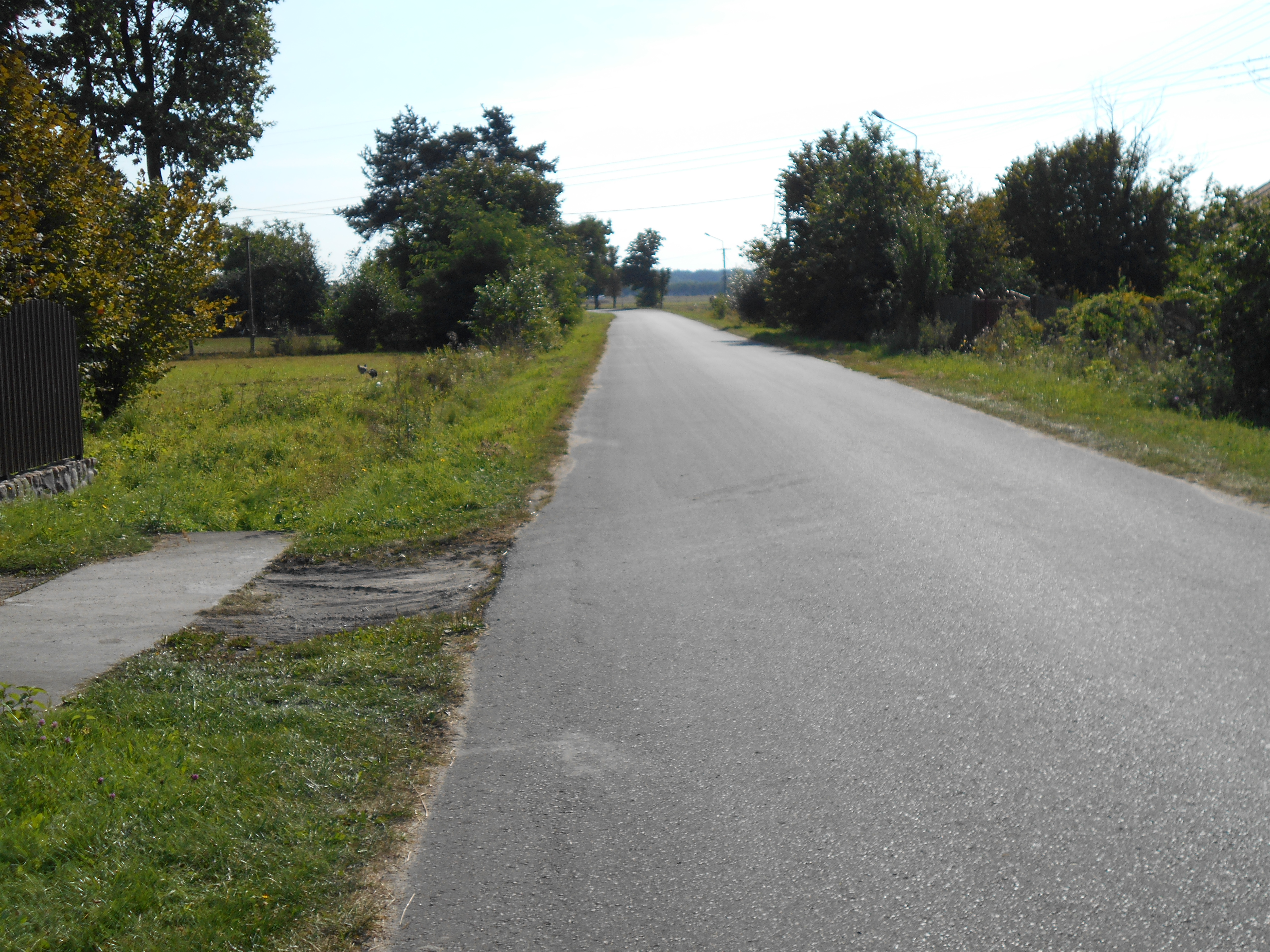 Miejscowość w gminie Dębe Wielkie